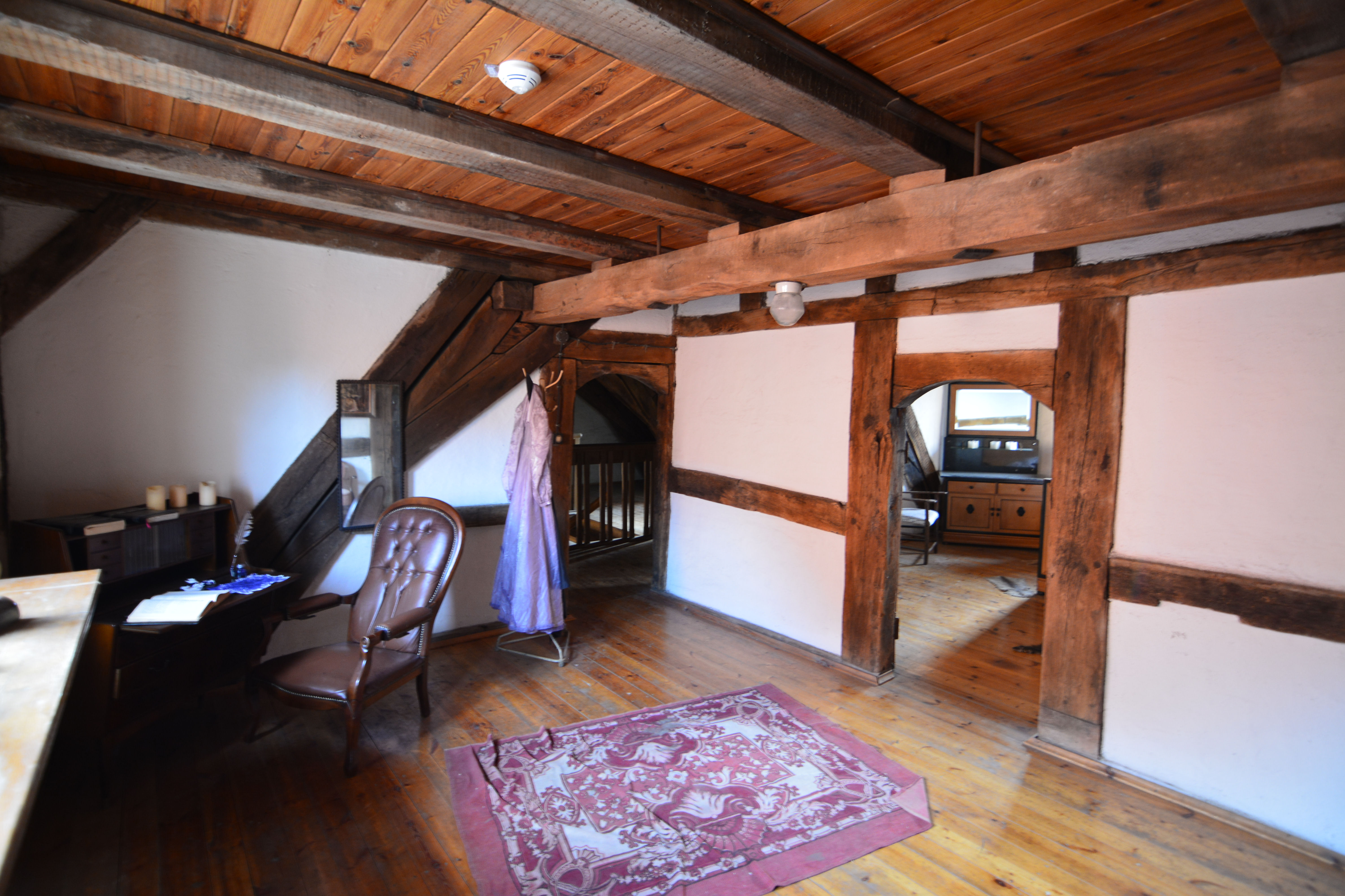 Pęzino - zamek, XIV, 1 poł. XVI, 1600, XIX